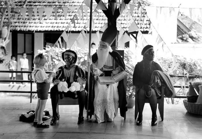 Negatief. Sinterklaas op de Montessorischool te Malang, Java